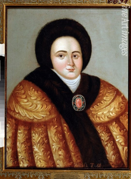 Portrait of Tsarina Evdokiya Feodorovna Lopukhina (1669-1731), the wife of tsar Peter I of Russia // Regional Art Gallery, Tver Неизвестный художник Портрет царицы Евдокии Фёдоровны, урожд. Лопухиной Середина XVIII в. Холст, масло. Областная художественная галерея, Тверь